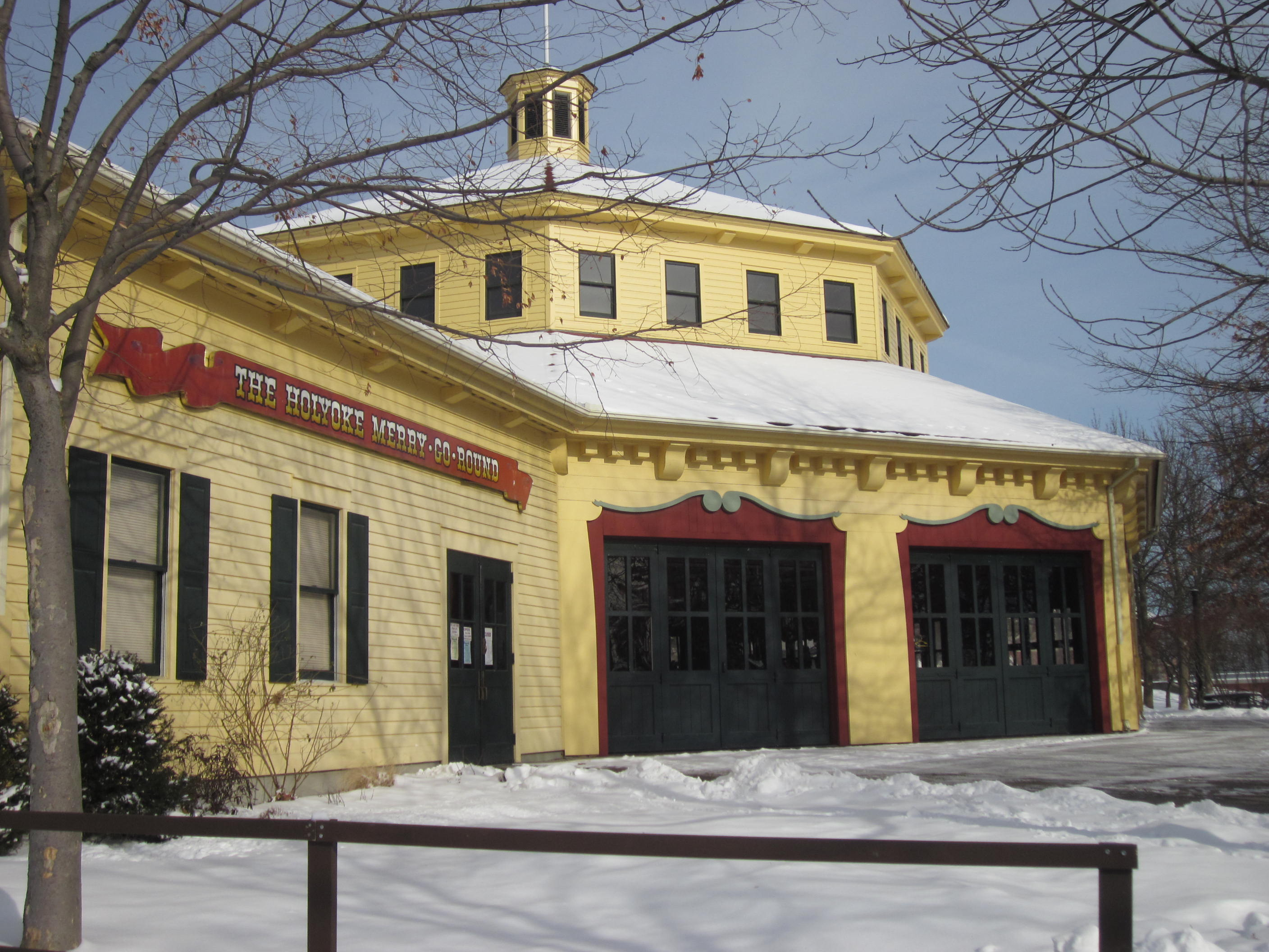 Holyoke, Massachusetts